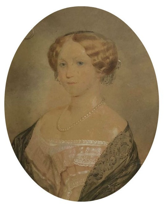 Мария Арсеньевна Бартенева (1816—1870), в замужестве Нарышкина.